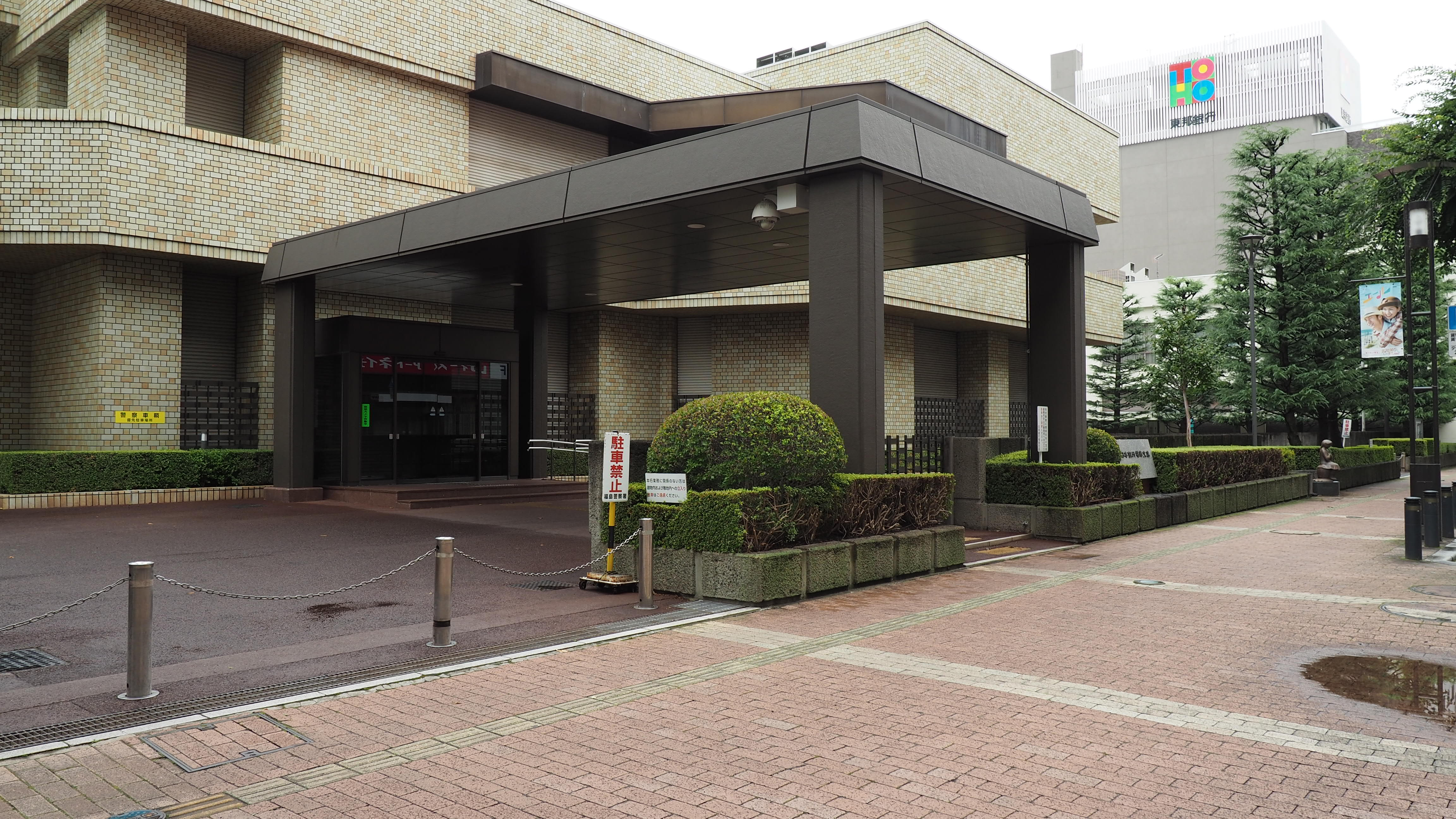 日本銀行福島支店。1899年出張所開設、1911年支店昇格。現店舗は1980年建設。